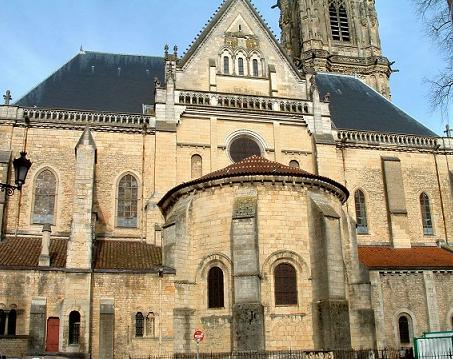 Cathédrale de Nevers, Chevet